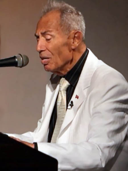 Akustikhane'de İlham Gencer